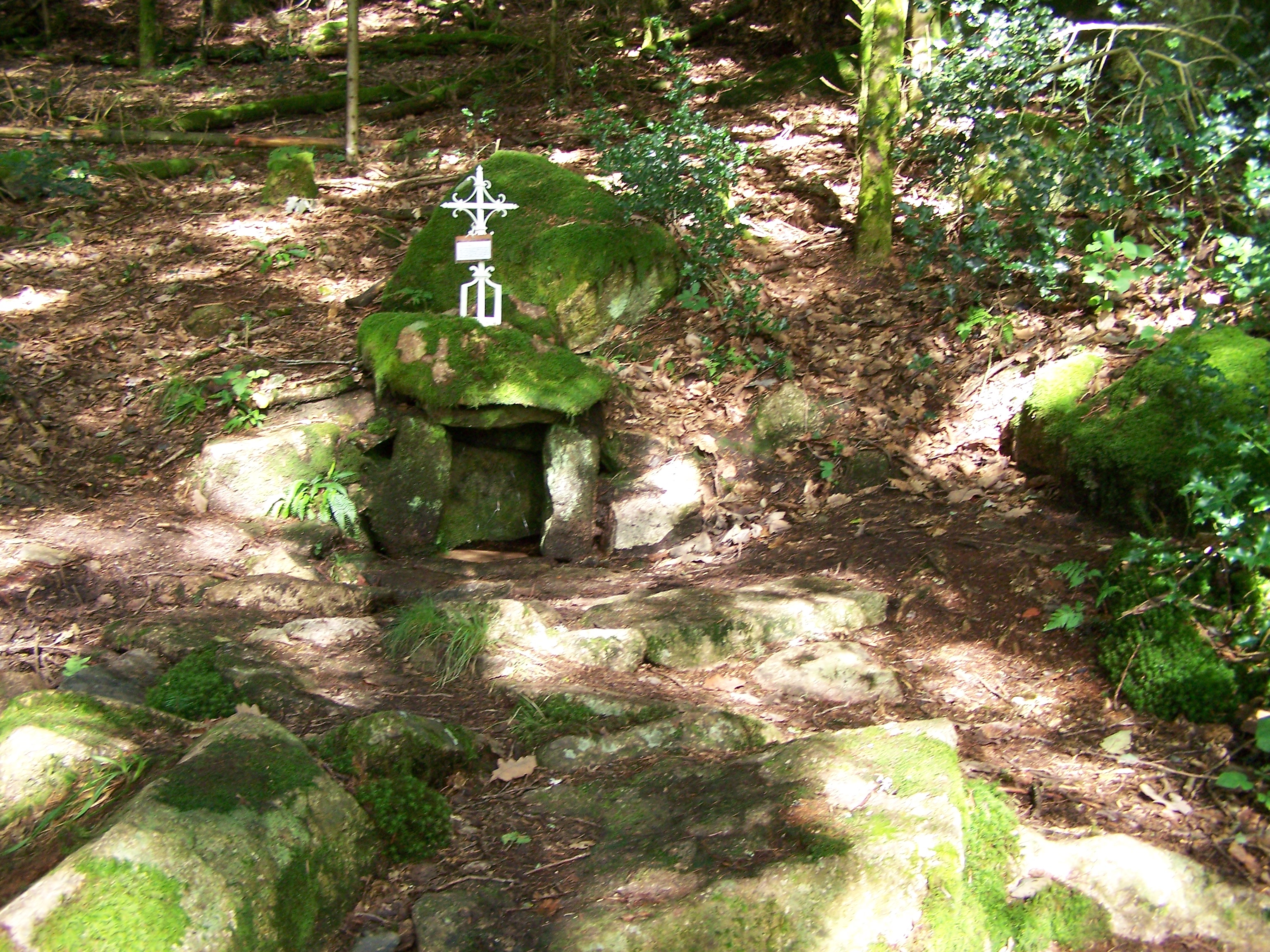 La "Fontaine Sainte-Marguerite" près de la chapelle de Faubouloin dans la commune de Corancy (Nièvre, France).